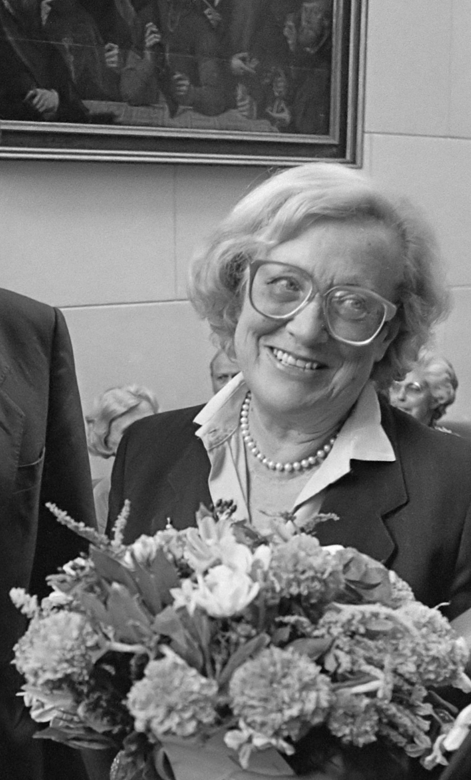 Burgemeester Van Thijn reikt Anne Frank Literatuurprijs uit aan Ida Fink 5 september 1985